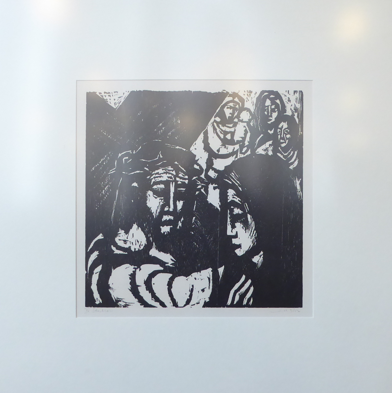 St. Suitbert Essen, Innenraum gestaltet von Willi Dirx, Kreuzweg - 14 Stationen, dargestellt durch 14 Holzschnitte entlang den Seitenwänden